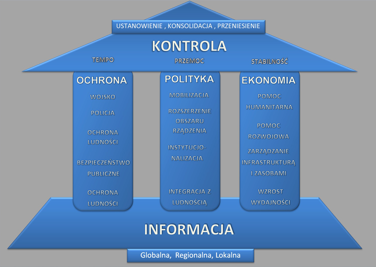 Grafika stworzona przez Davida Kilcullen’a w artykule: trzy filary doktryny przeciwpartyzanckiej i przetłumaczona na język polski.